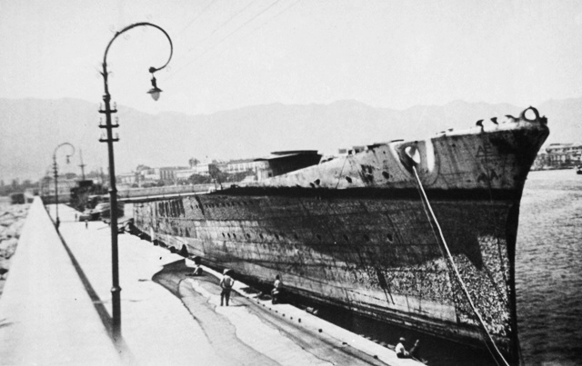 Il relitto recuperato dell'incrociatore Ulpio Traiano nel giugno 1948 a Palermo, dopo i lavori di recupero eseguiti dal 10 ottobre 1946 al 24 luglio 1947